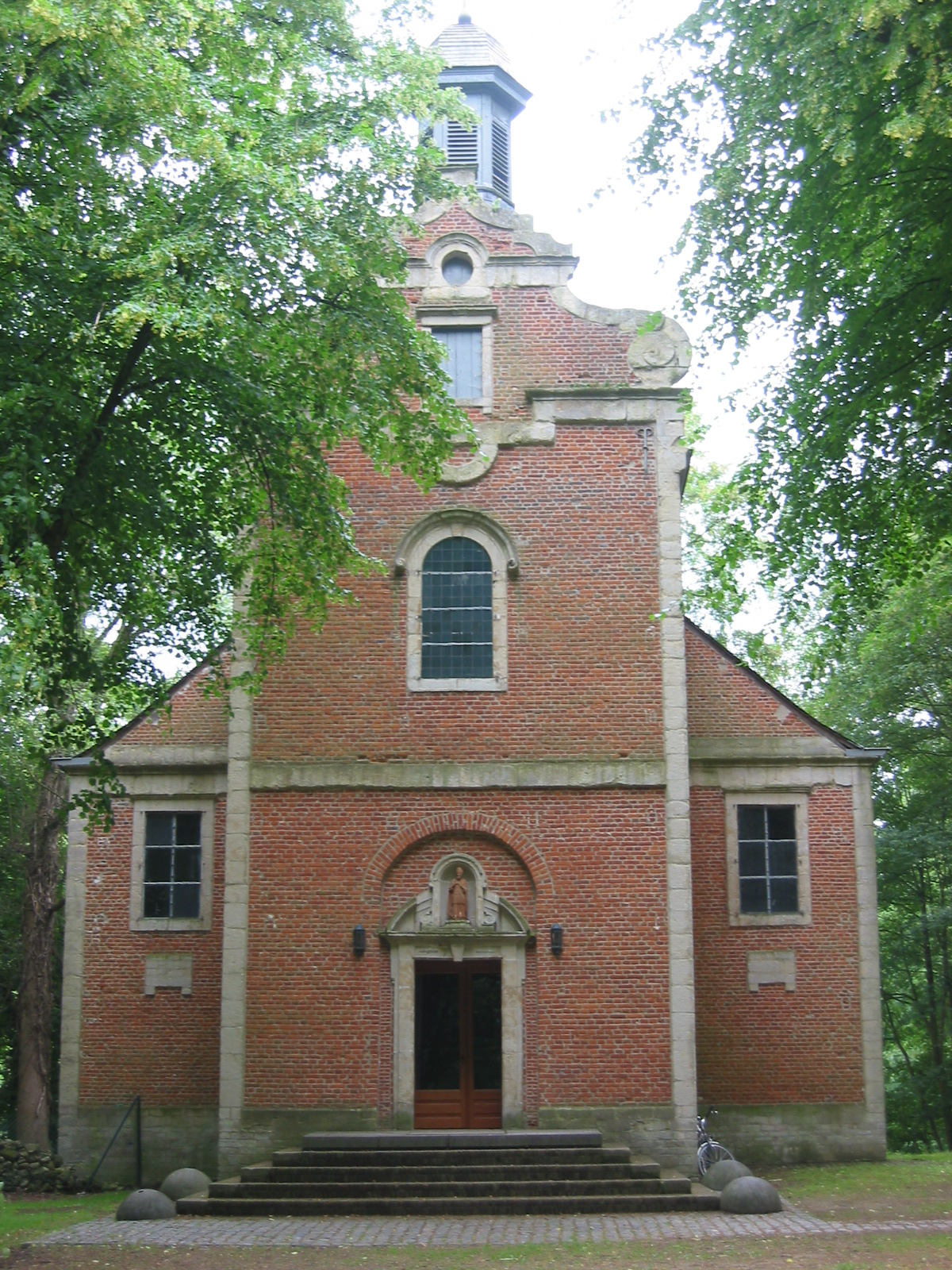 De Sint-Hubertkapel in het park van Tervuren. (Gemaakt in juni 2006)